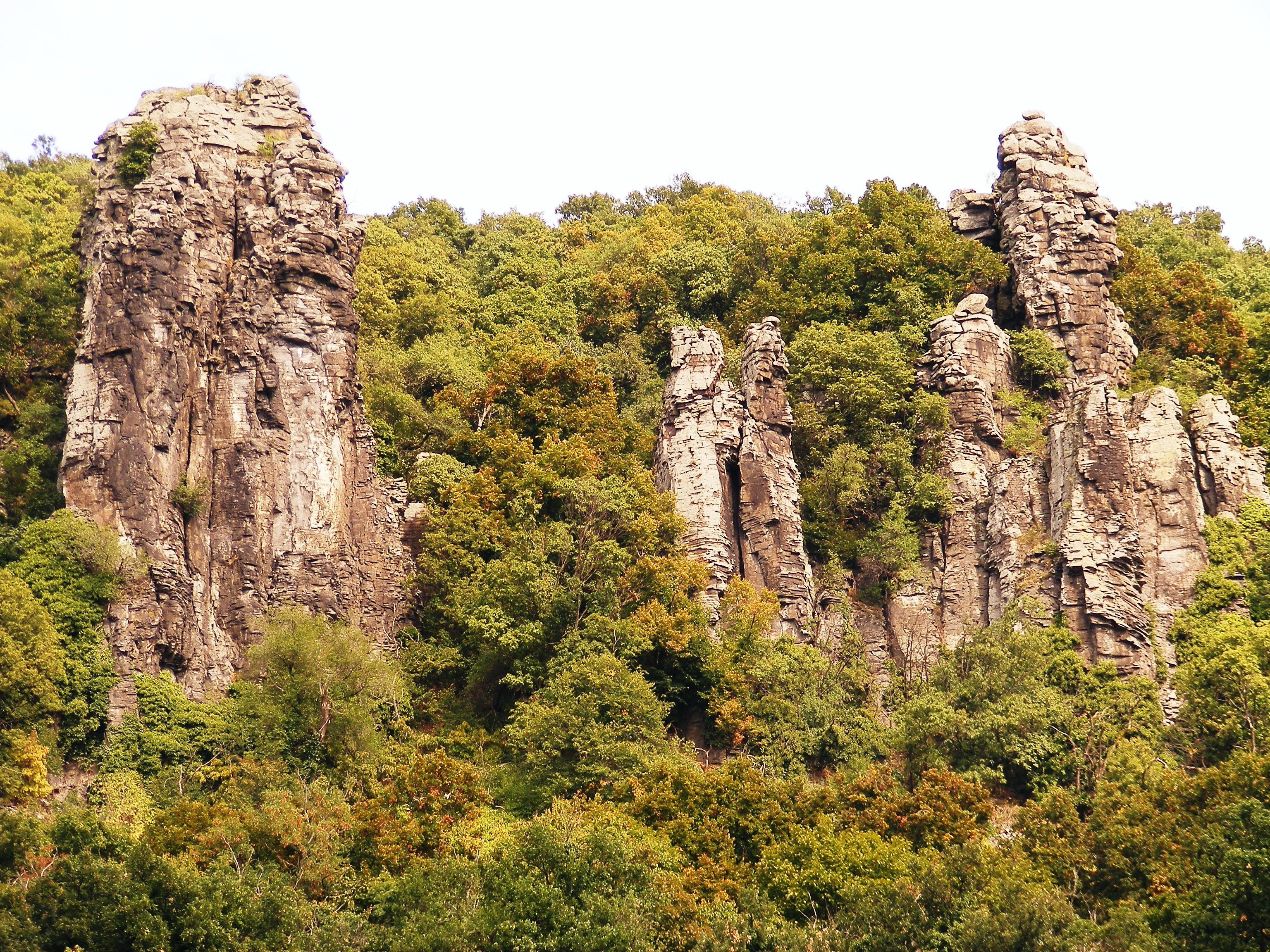 Die Basaltorgeln des Berges Badascony